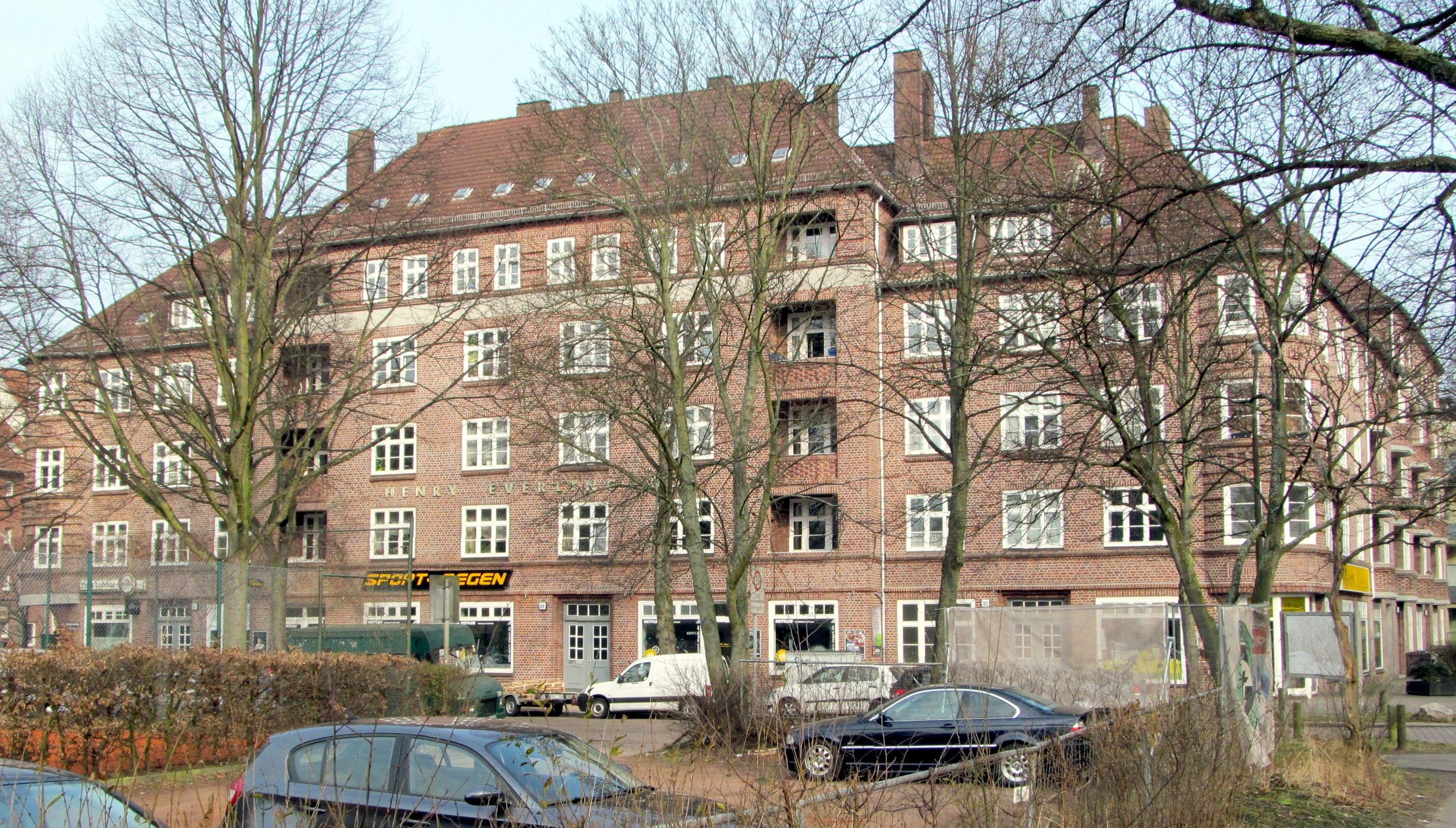 Genossenschaftliche Wohnanlage "Henry-Everling-Hof" im Hamburger Stadtteil Hamm (Lohhof/Moorende/Hammer Steindamm), erbaut 1925 von G. Lehne